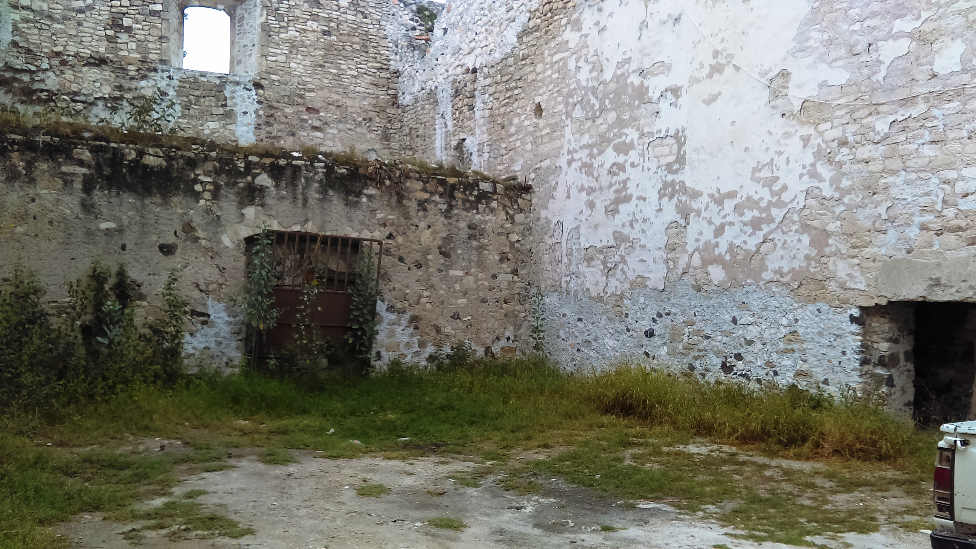 Edifico La Comunidad en Metztitlán, Hidalgo, México.